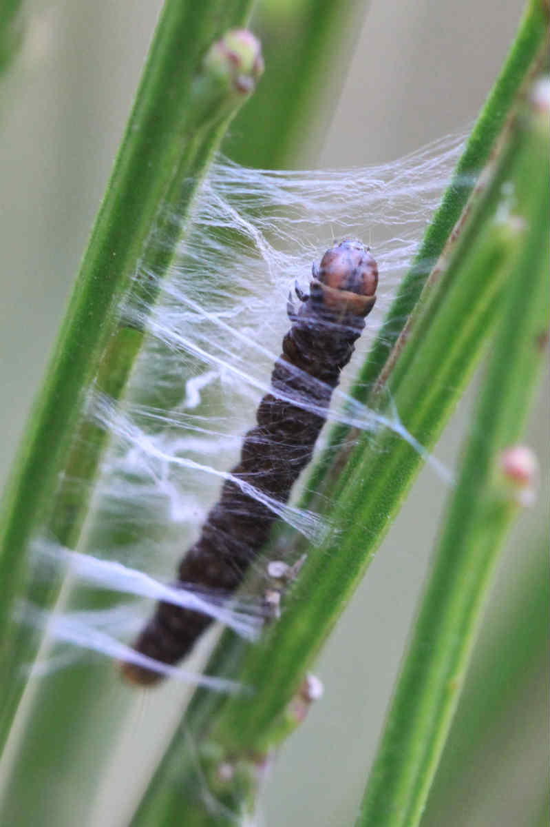 Agonopterix assimilella, am 29.03.2017 an Besenginster in der Schwetzinger Hardt